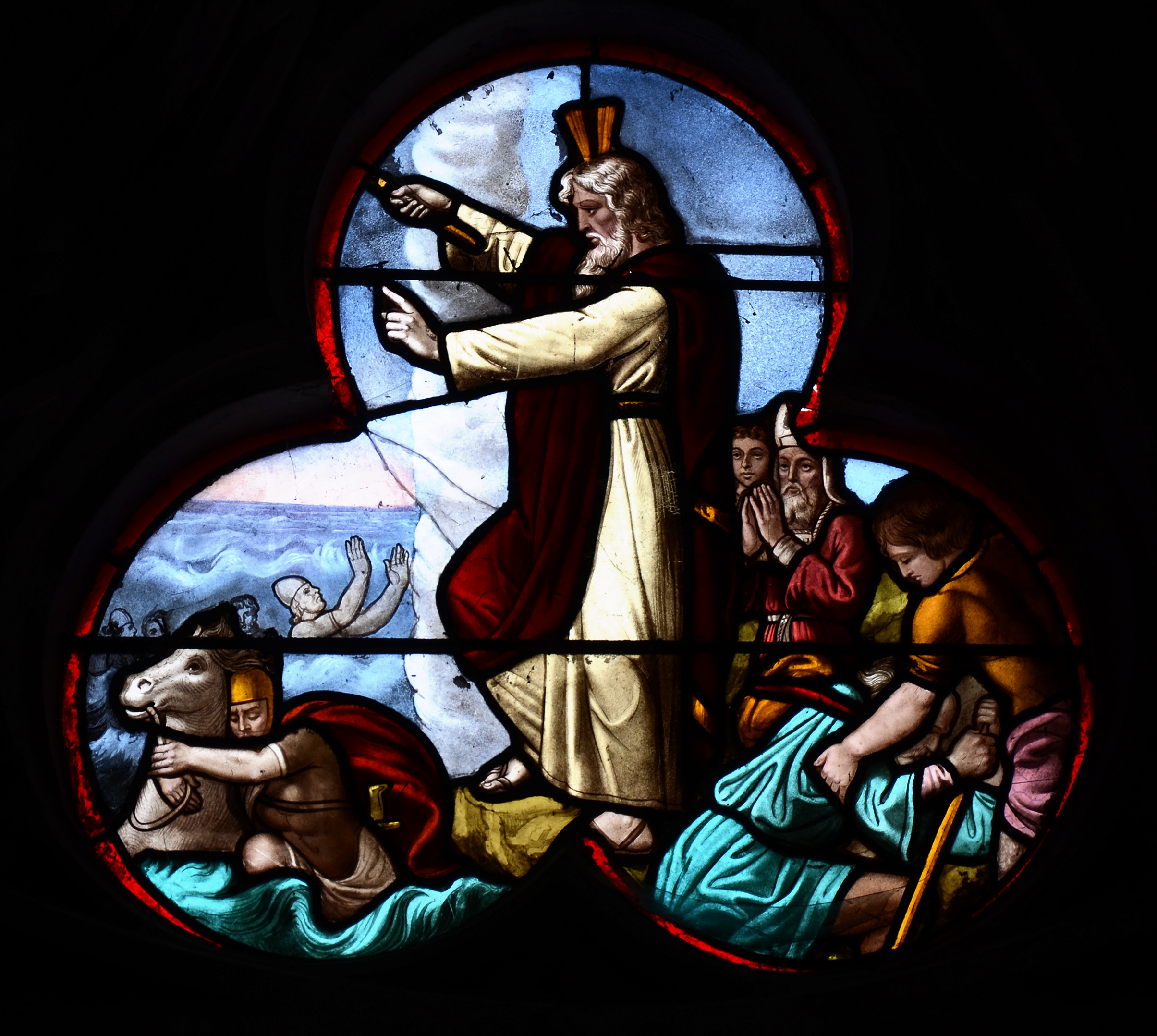 Vitrail de la basilique Notre-Dame de L'Epine : le passage de la Mer Rouge.